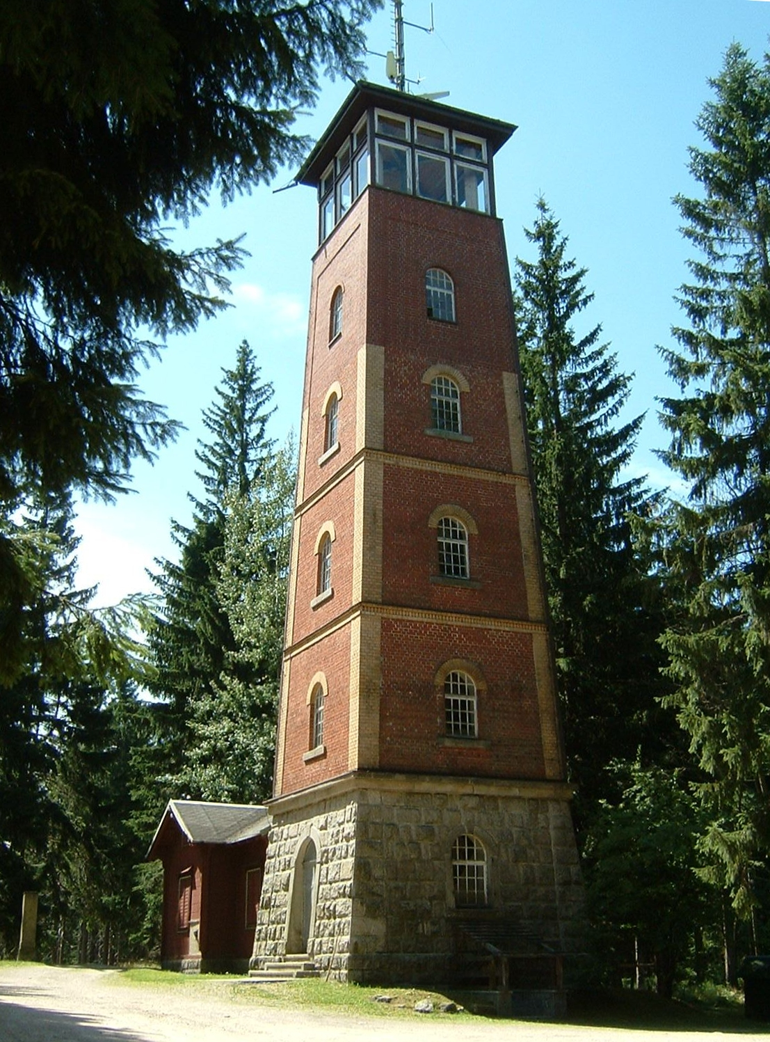 Kuhberg (Stützengrün)(795m), Aussichtsturm und dahinter Blockhaus, beide aus dem Jahr 1894. Ganz links steht die gut mannshohe Triangulationssäule von 1876. Sie war Station 140 Schönheide im Erzgebirge als Vermessungspunkt zweiter Ordnung der Königlich-Sächsischen Triangulirung